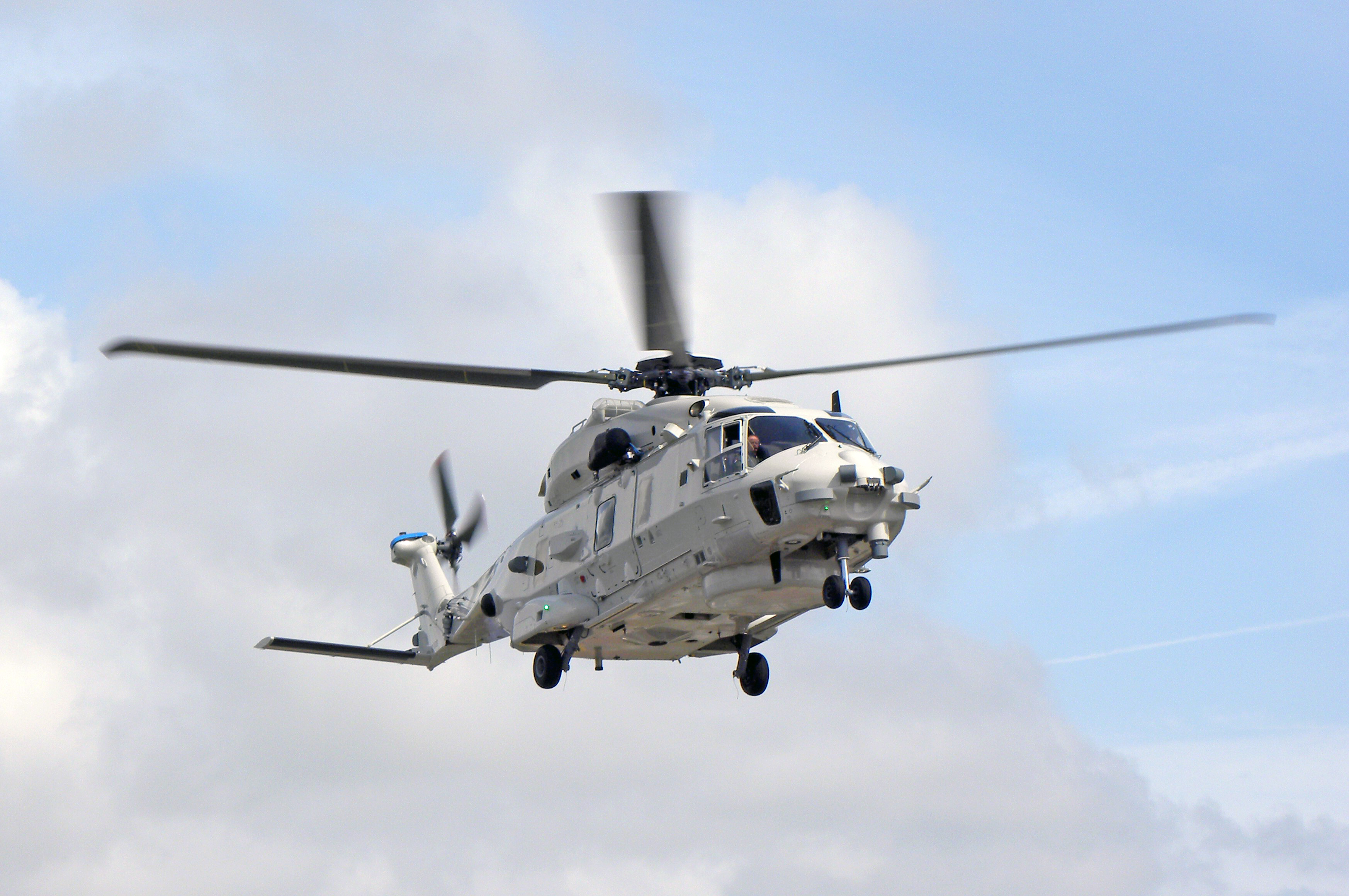 NH-90 NATO Frigate Helikopter (NFH).